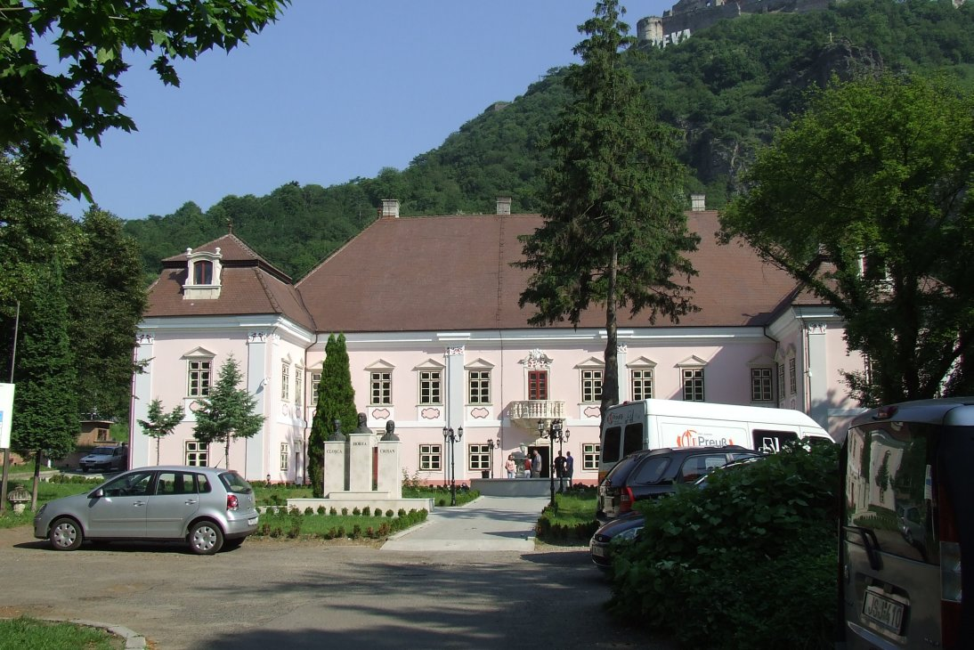 Magna Curia Castle, Deva, Romania